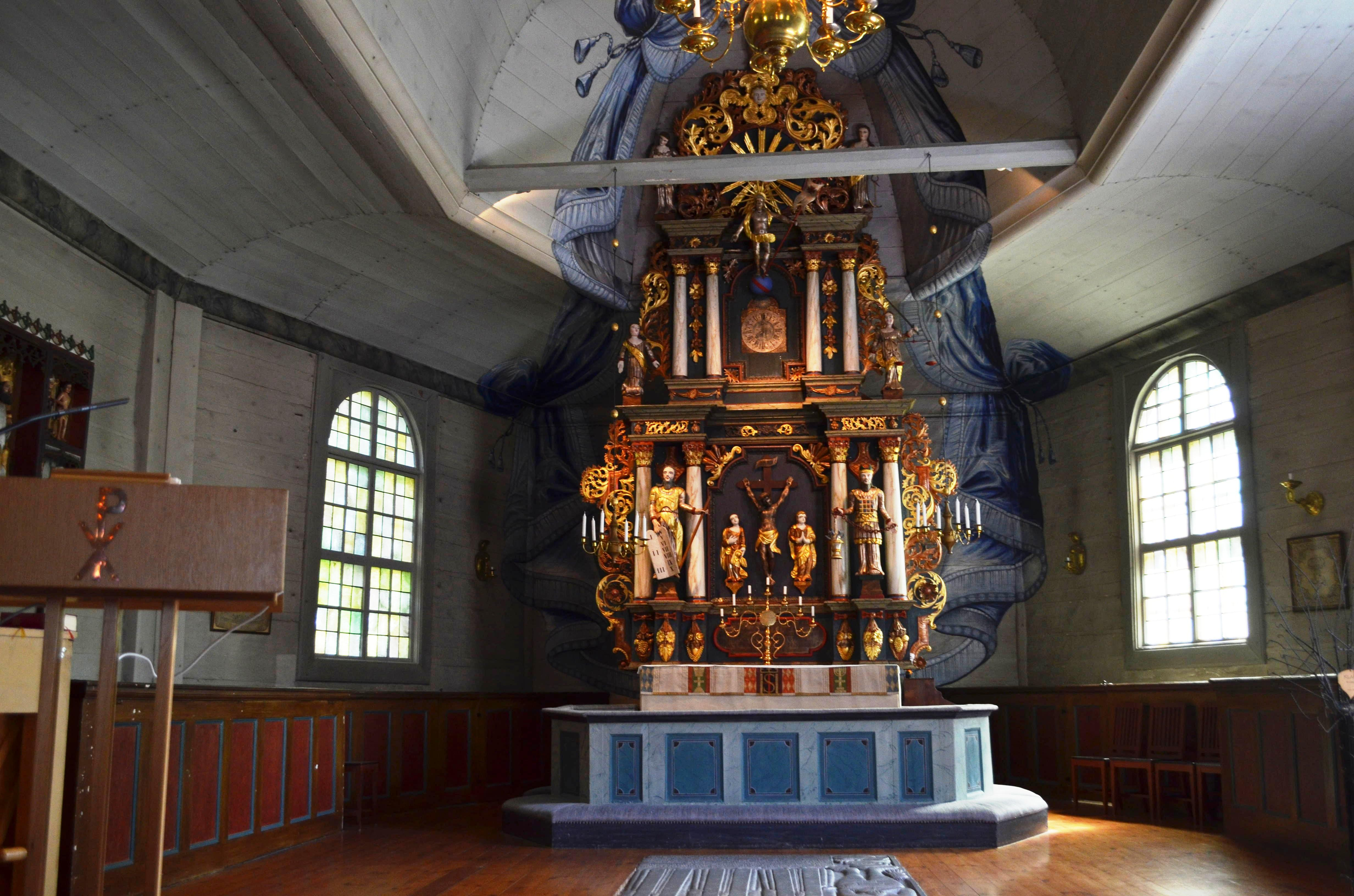 Visnums kyrka kyrksalen 2017